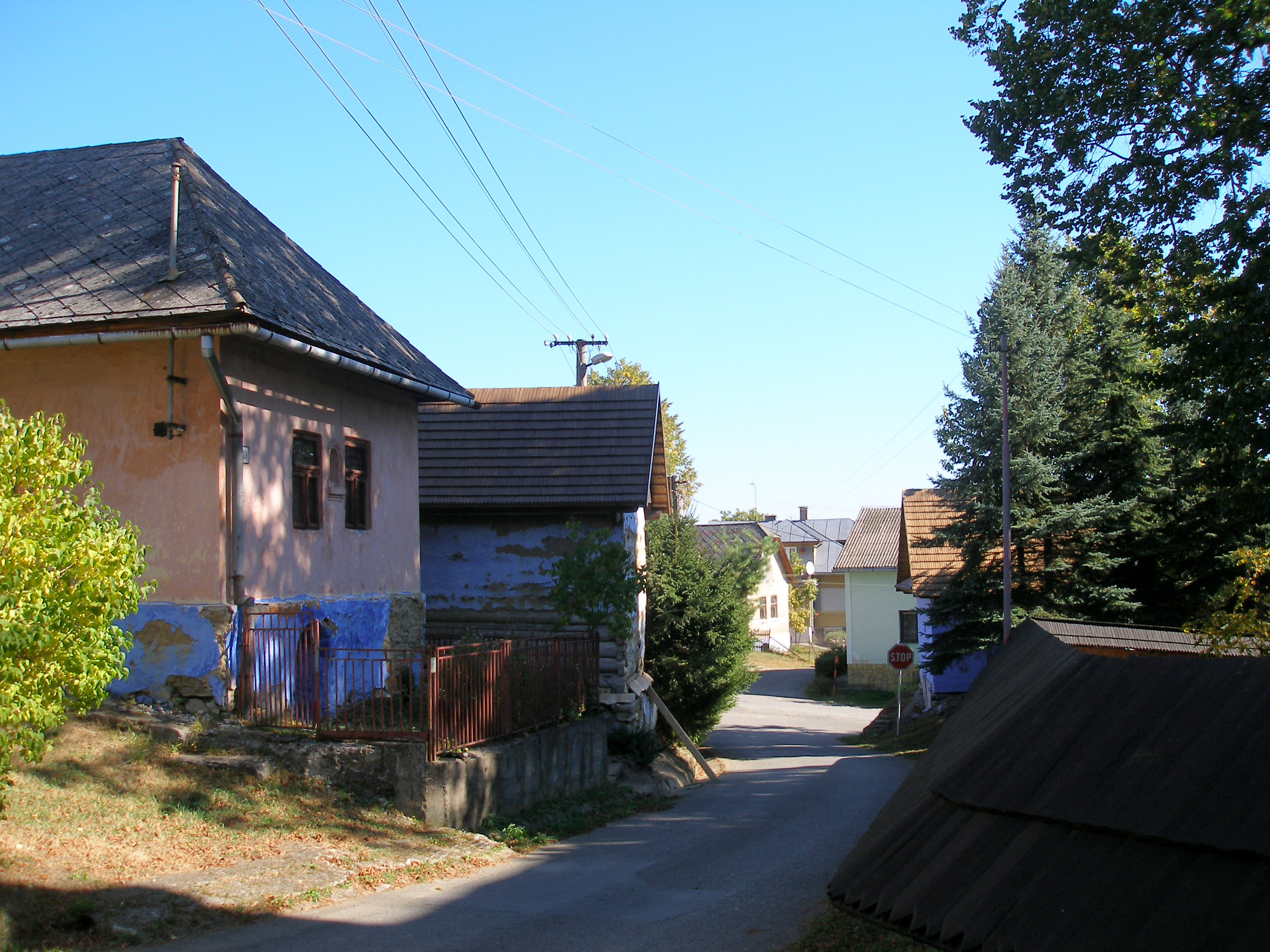 Šarišská obec Hervartov okres Bardejov.